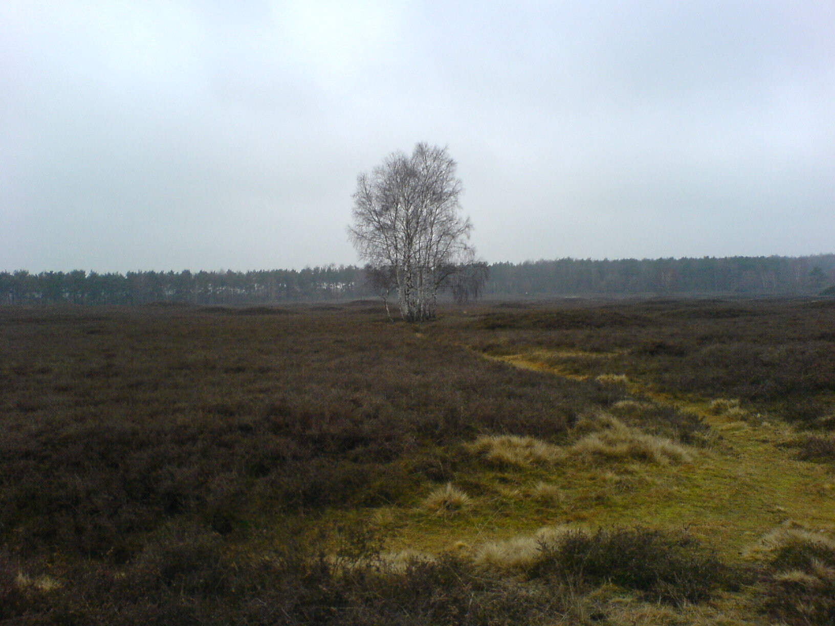 Übersicht über das Pestruper Gräberfeld mit Blick auf die Birkengruppe, welche die Absturzstelle eines amerikanischen Bombers (April 1944) markiert.